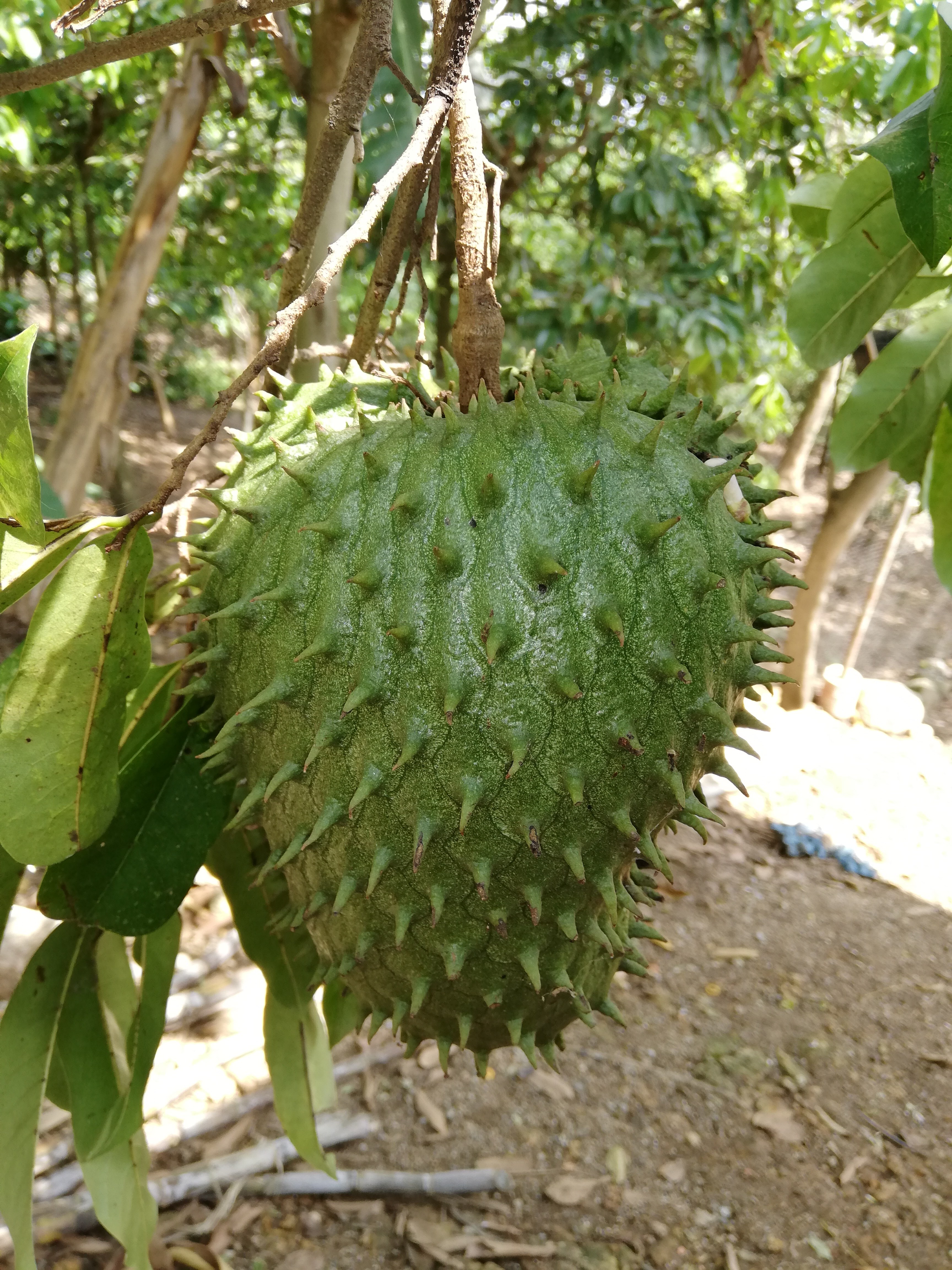 Fruto de Annona muricata (guanábana)